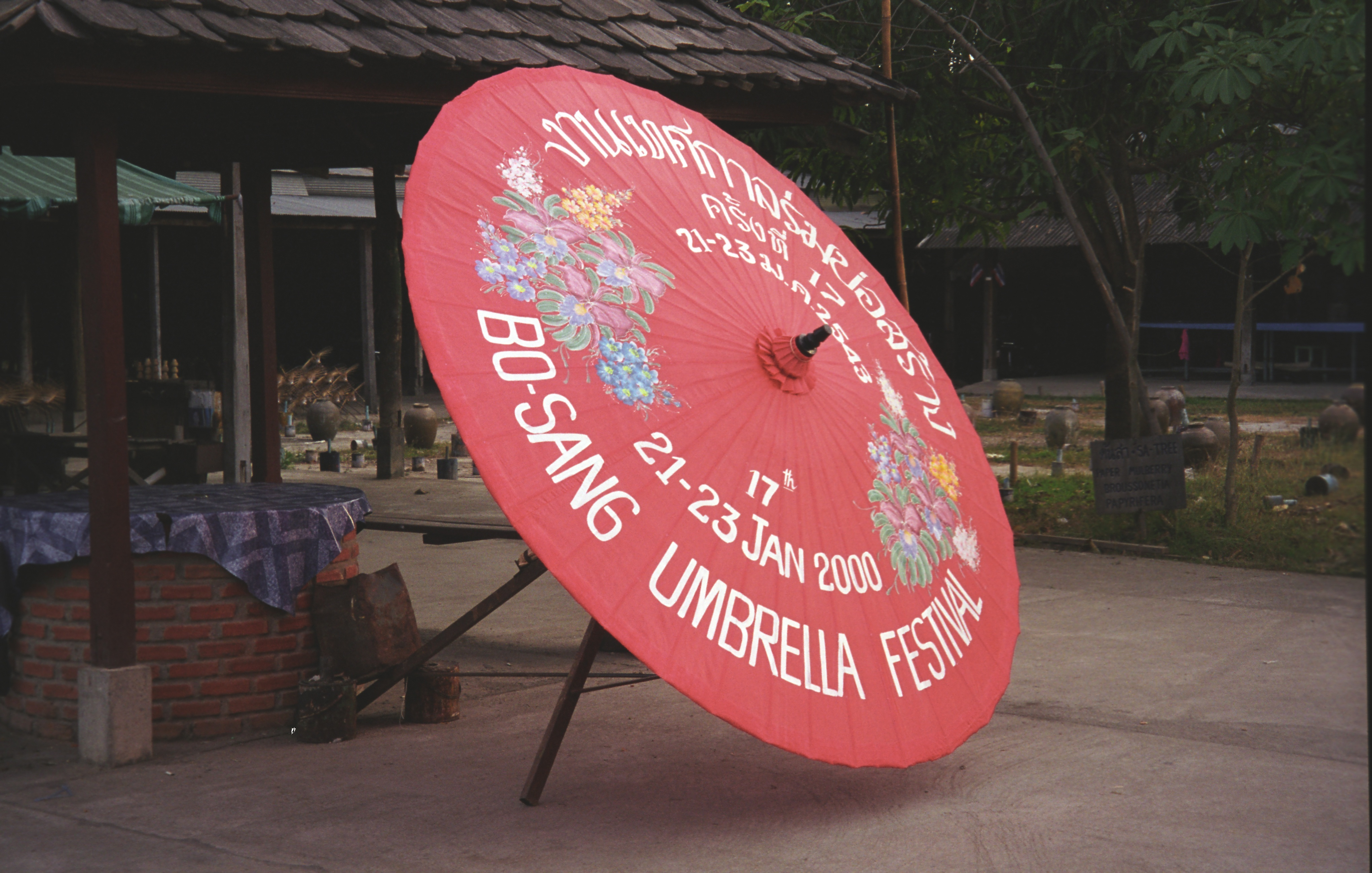 Schirm rot mit Aufschrift Bo Sang Chiang Mai Thailand